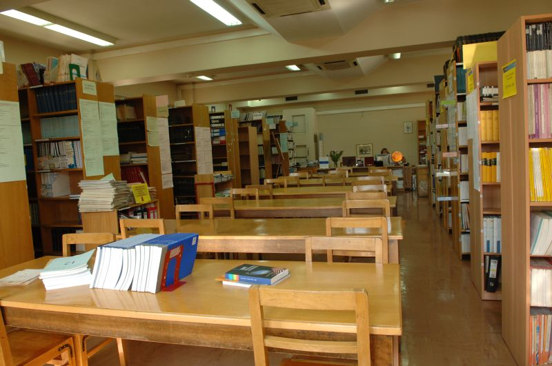 aueb library